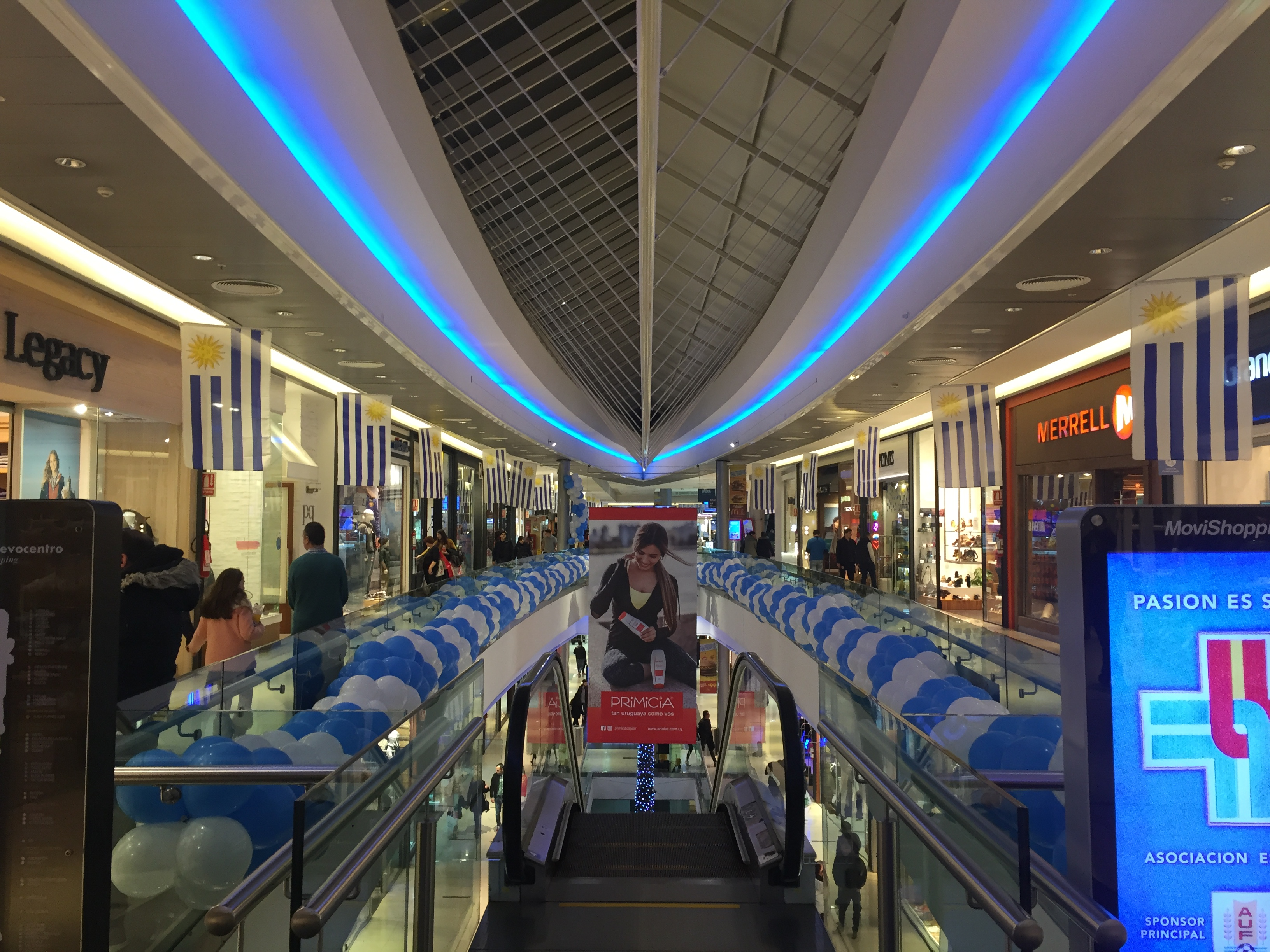 Nuevocentro Shopping engalanado de celeste en ocasión del Mundial de Rusia 2018.